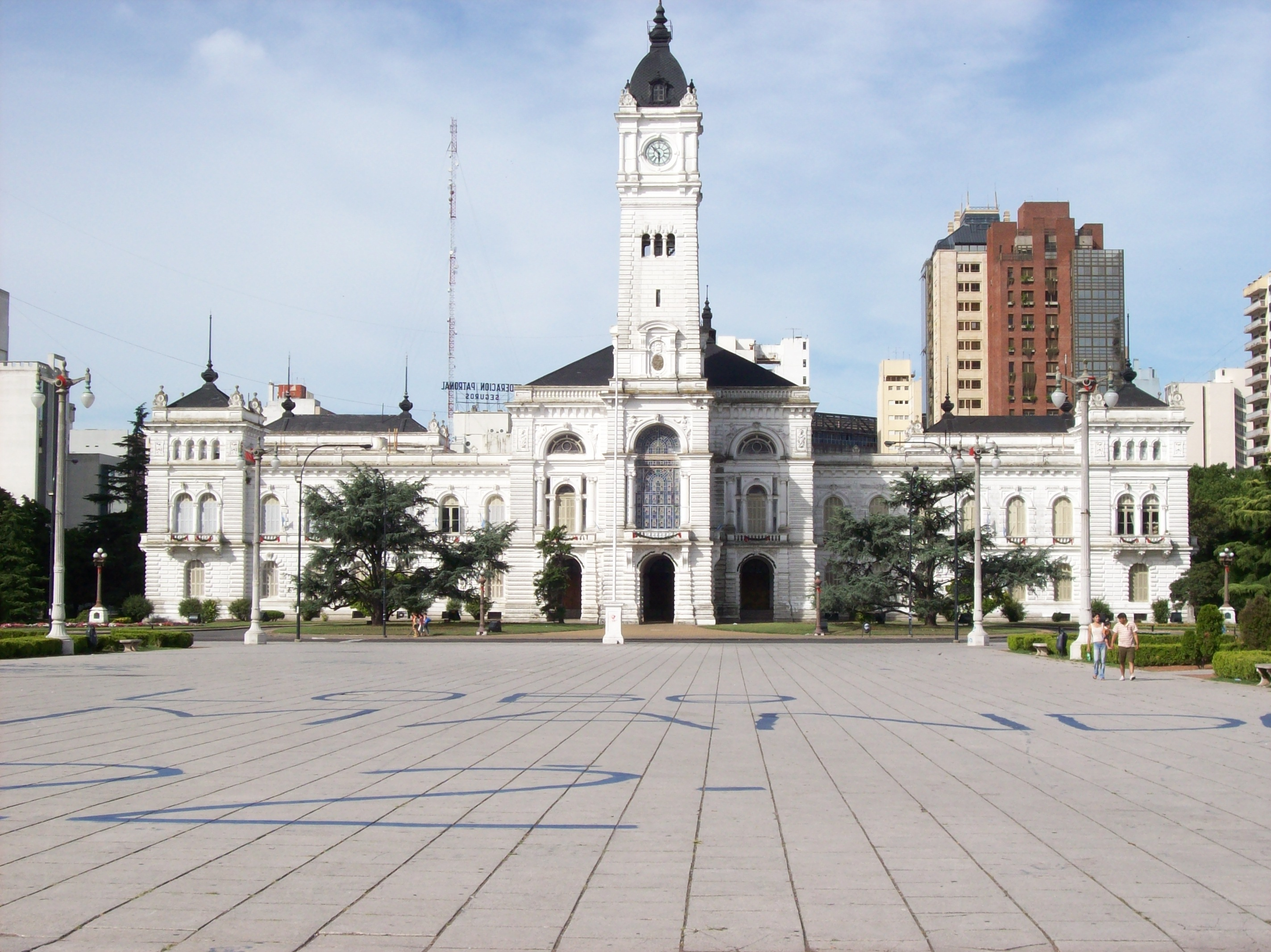 Edificio de la Municipalidad de La Plata, frente a la Plaza Moreno.